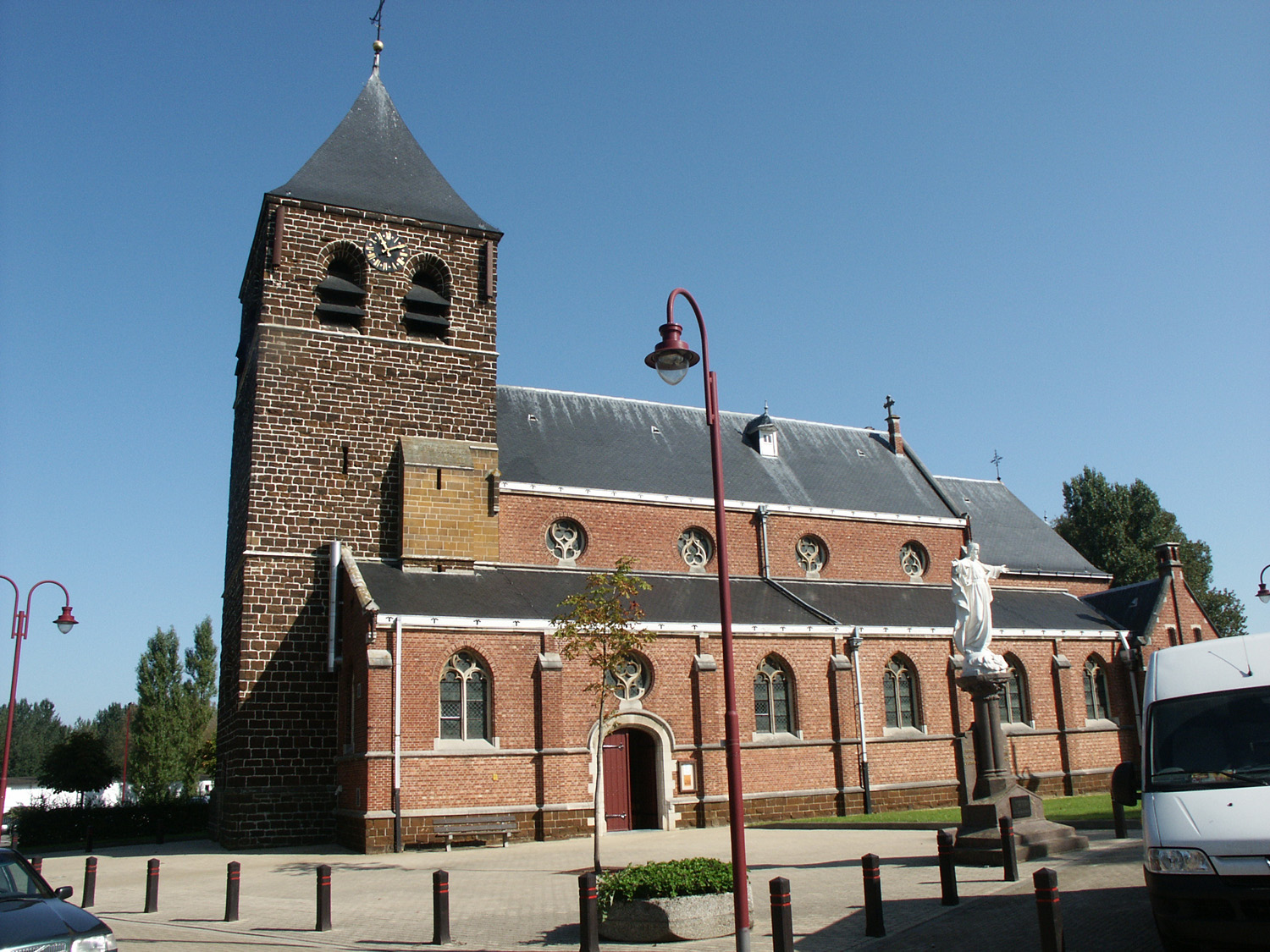 Sint-Michielskerk, Messelbroek, gebouwd in 1909 (behalve de toren)